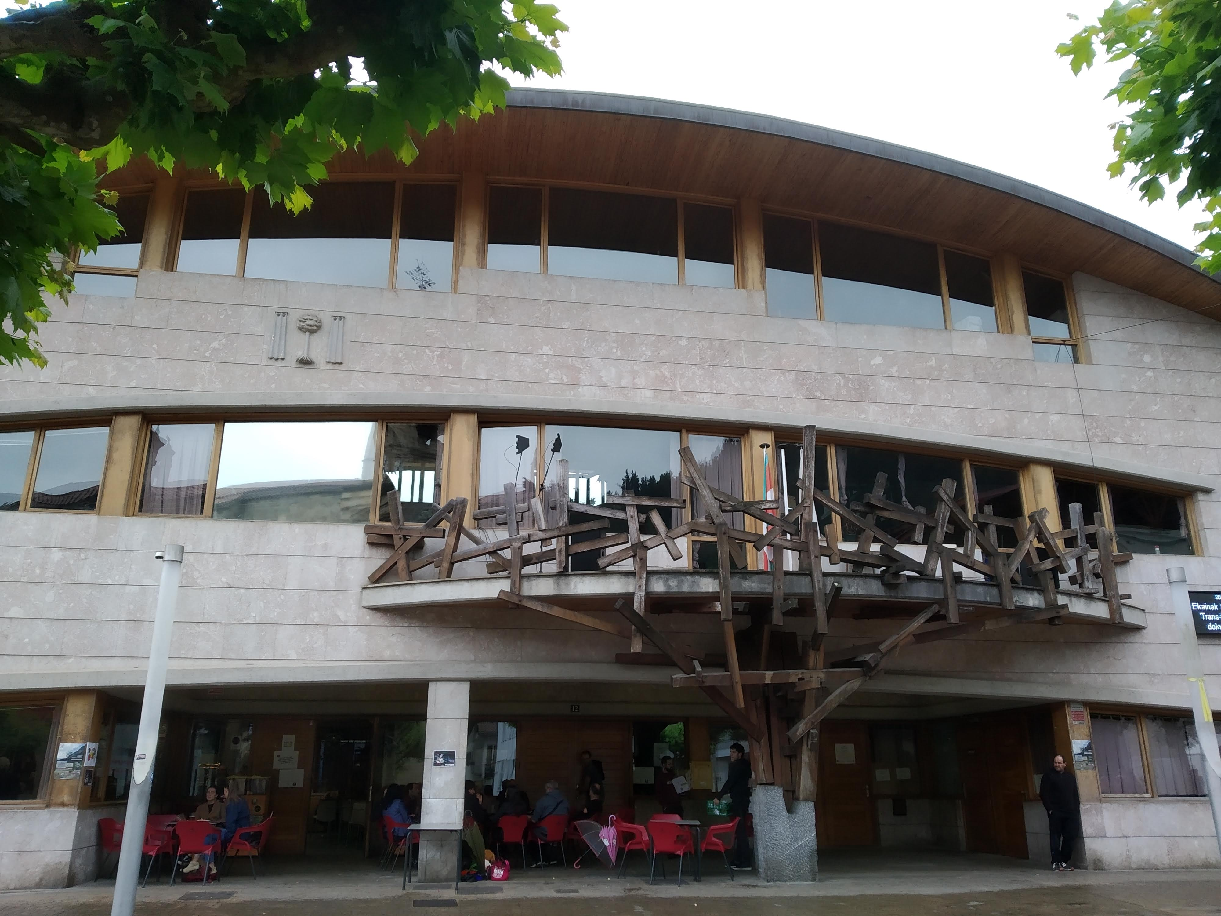 Legorretako Udaletxea, balkoian duen Koldobika Jauregiren eskulturarekin